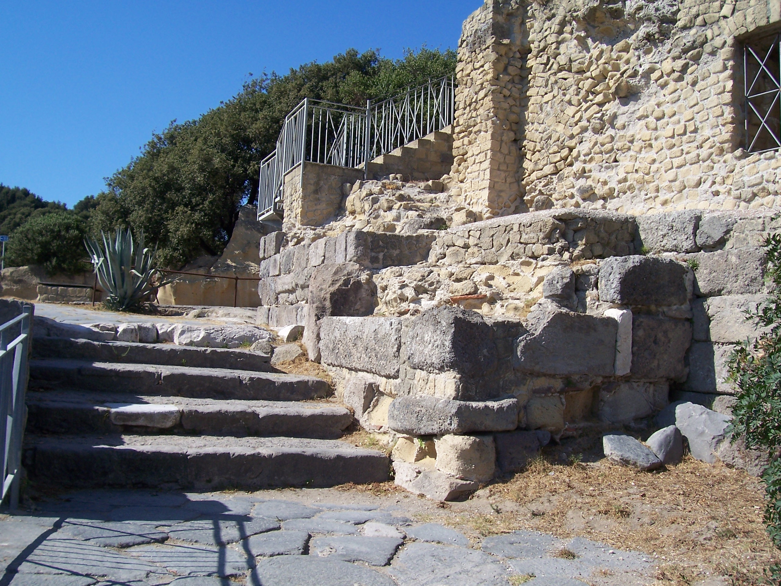 Entrada a la Acrópolis de Cumas.